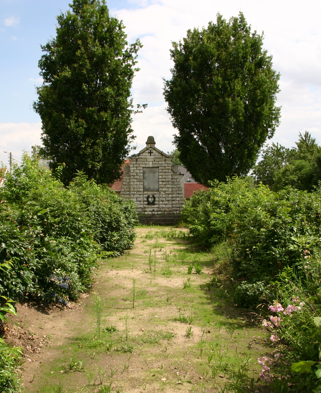 Ligota Bialska (dodatkowa nazwa w j. niem. Ellguth) – wieś w Polsce położona w województwie opolskim, w powiecie prudnickim, w gminie Biała.